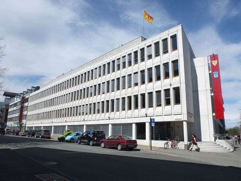 Fylkeshuset, Erling Skakkes gt 14